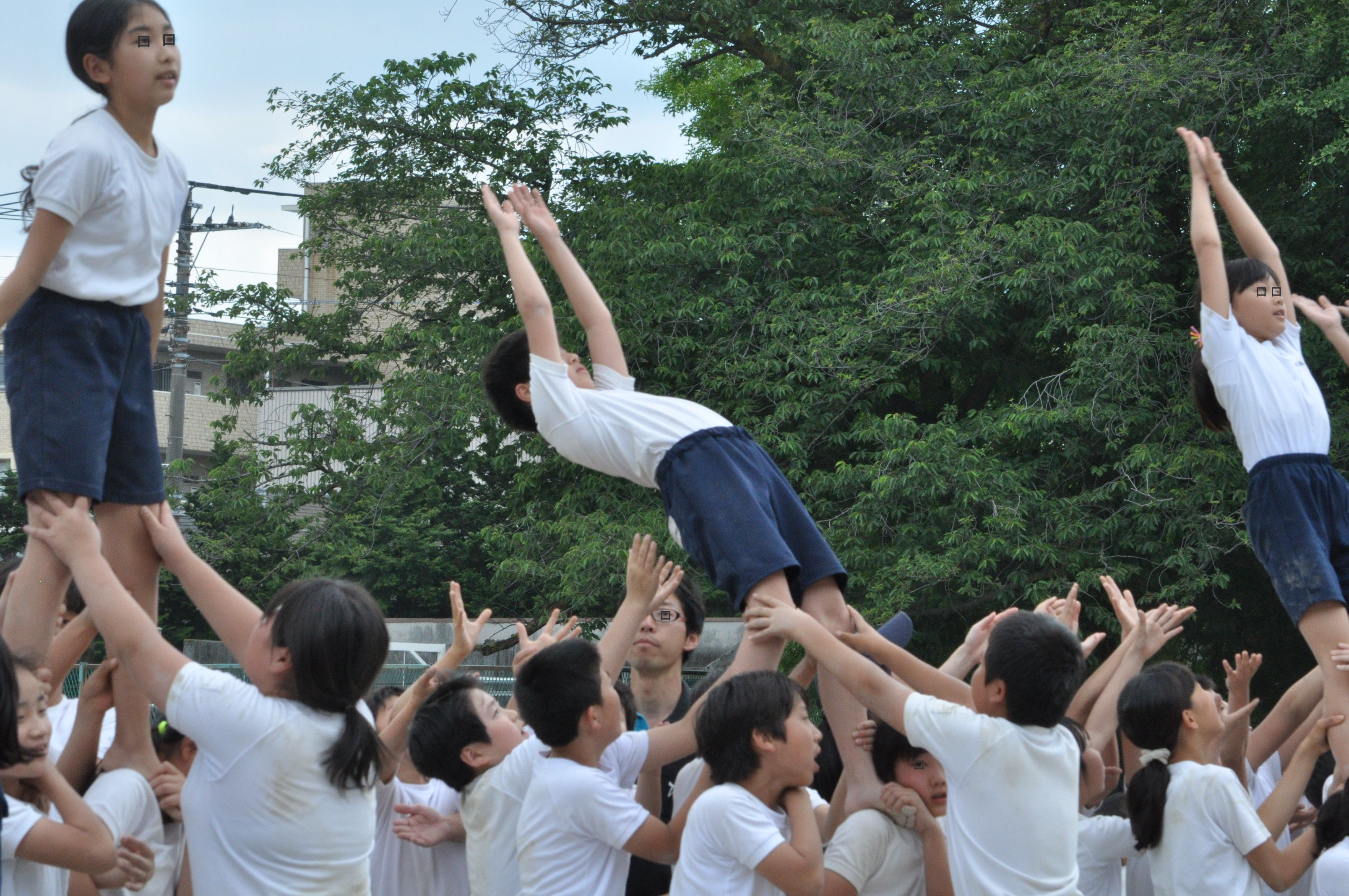 運動会 組体操